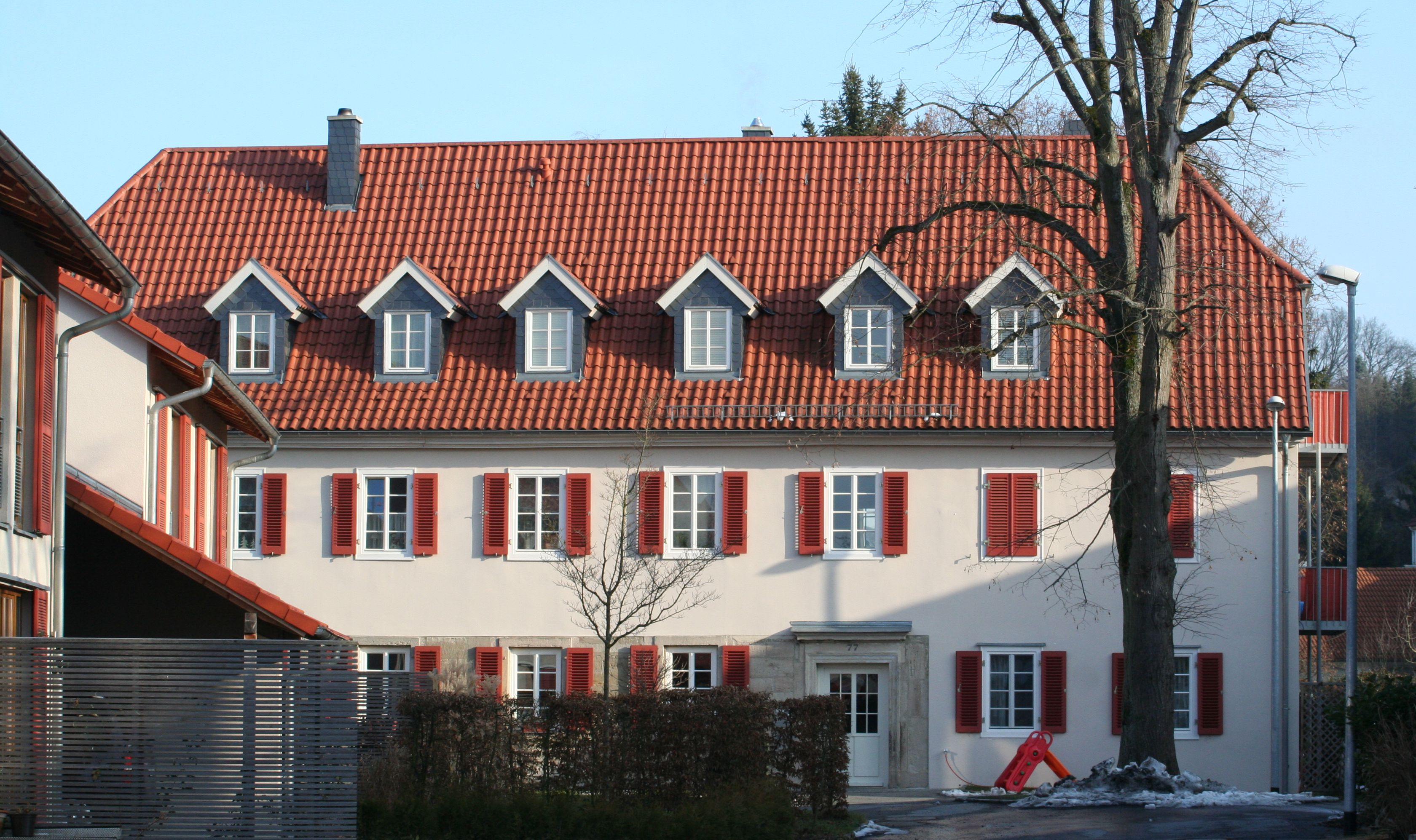 Ketschendorfer Straße 77 in Coburg